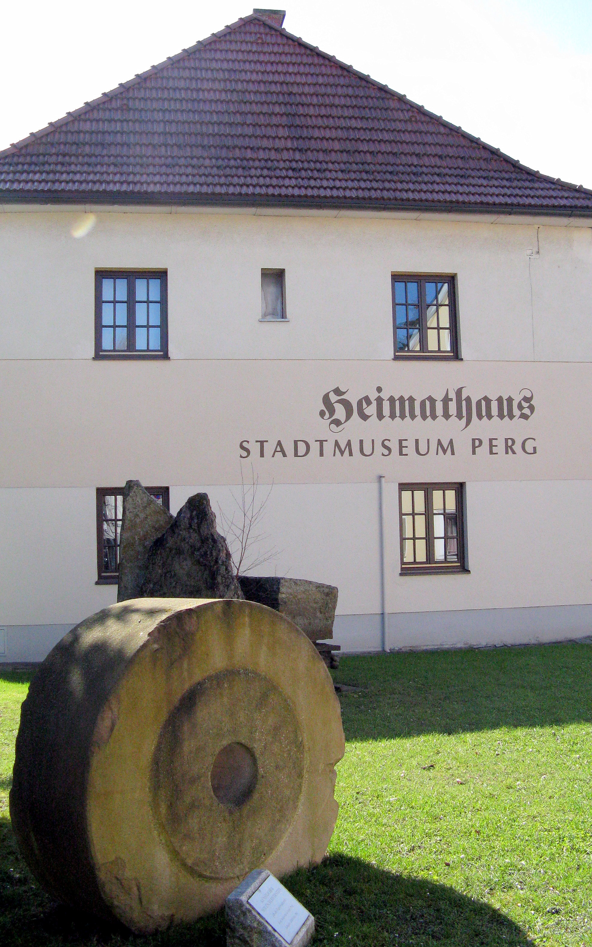 Perg in Oberösterreich. Stifterstrasse N° 1. Neuzeitliches Gewerbe- und Wohnhaus (ehemals Maler und Anstreicher Josef Uhl). Umgebaut zum Heimathaus-Stadtmuseum Perg. Im Vordergrund ein Holzschleifstein der Firma Fries-Burgholzer in Perg (Nachfolgeunternehmen Firma Synthesa)